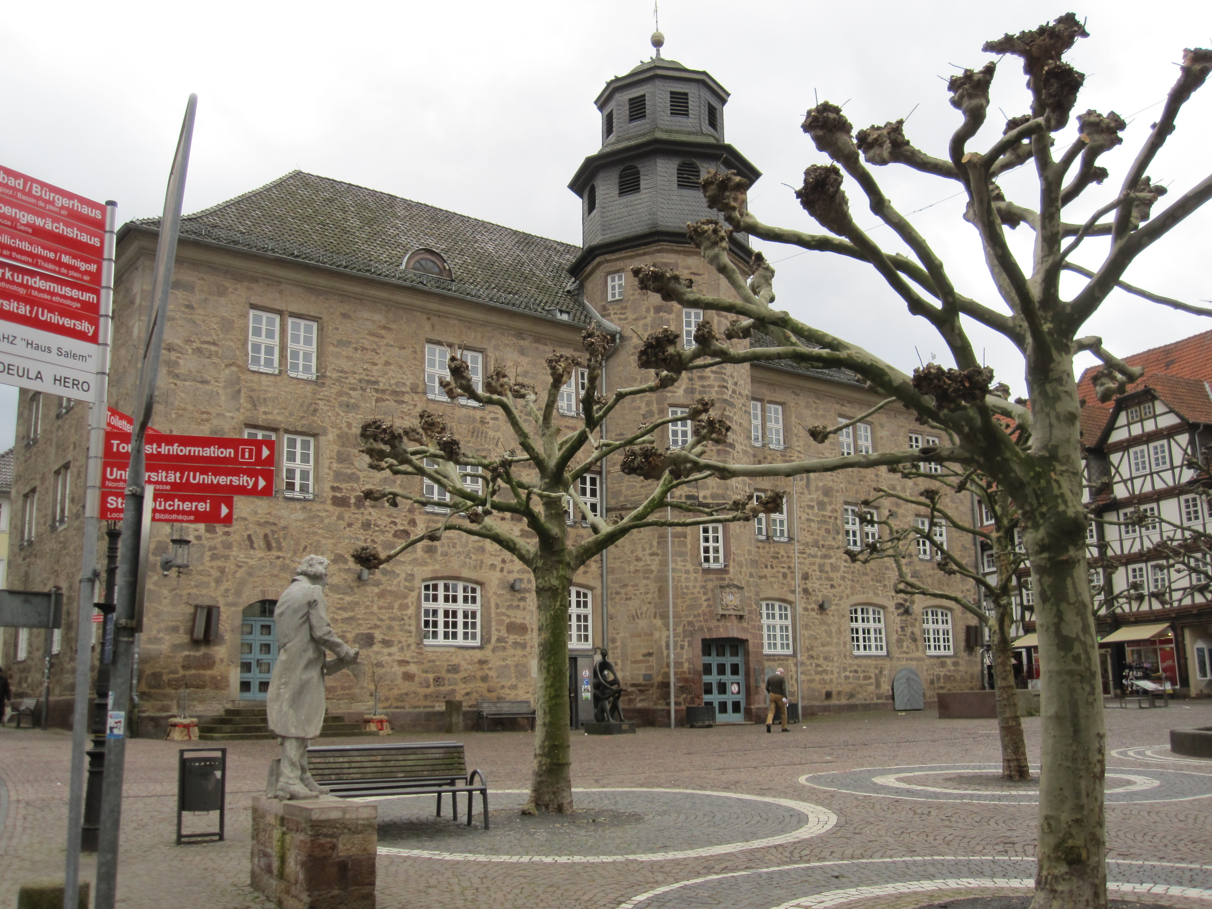 Witzenhausen: Renaissancebau von 1590, neu errichte Ende des 19. Jahrhunderts. Davor links eine Statue, Jacob Grimm darstellend, der am 17. Dezember 1837 - fünf Tage nach seiner Entlassung als Professor und der Landesverweisung durch den hannoverschen König - auf dem Marktplatz von Witzenhausen eine Freiheitsrede vor den Witzenhüssern und vor Göttinger Studenten hielt. Plastik aus den 2000er Jahren von Karin-Bormann-Roth.